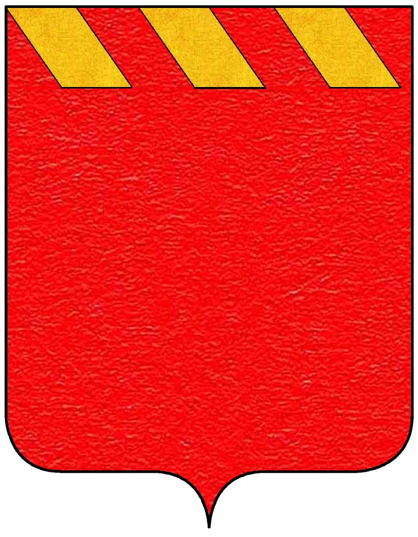 Stemma della famiglia Ludovisi